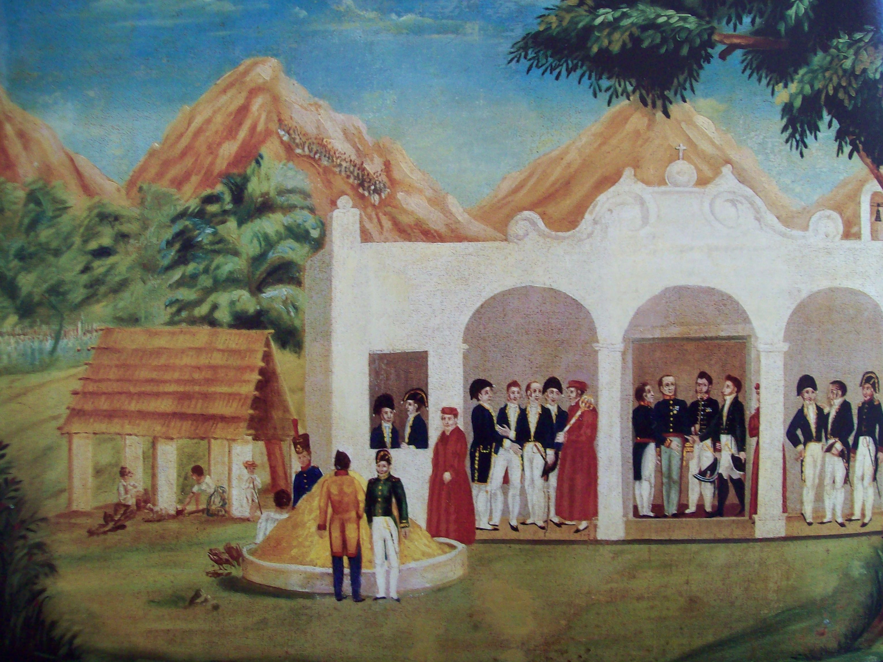 Entrevista de los señores generales O'Donojú y Novella con las Tres Garantías de Agustín de Iturbide. Anónimo del sigo XIX, óleo sobre tela. Museo Nacional de Historia, INAH México.